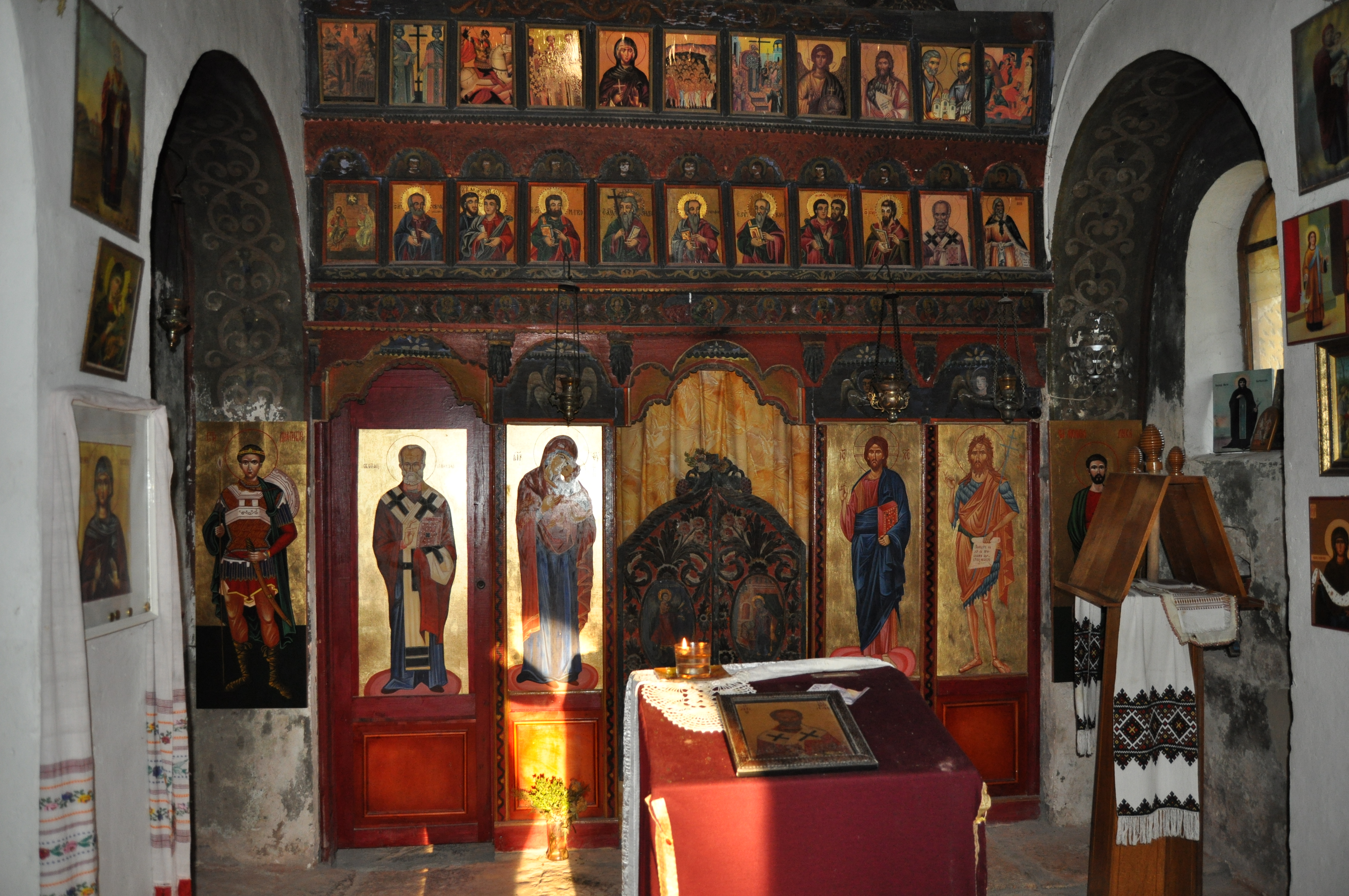 Ikonostas v kostele sv. Mikuláše ve vesnici Manastri, Jelašničká soutěska